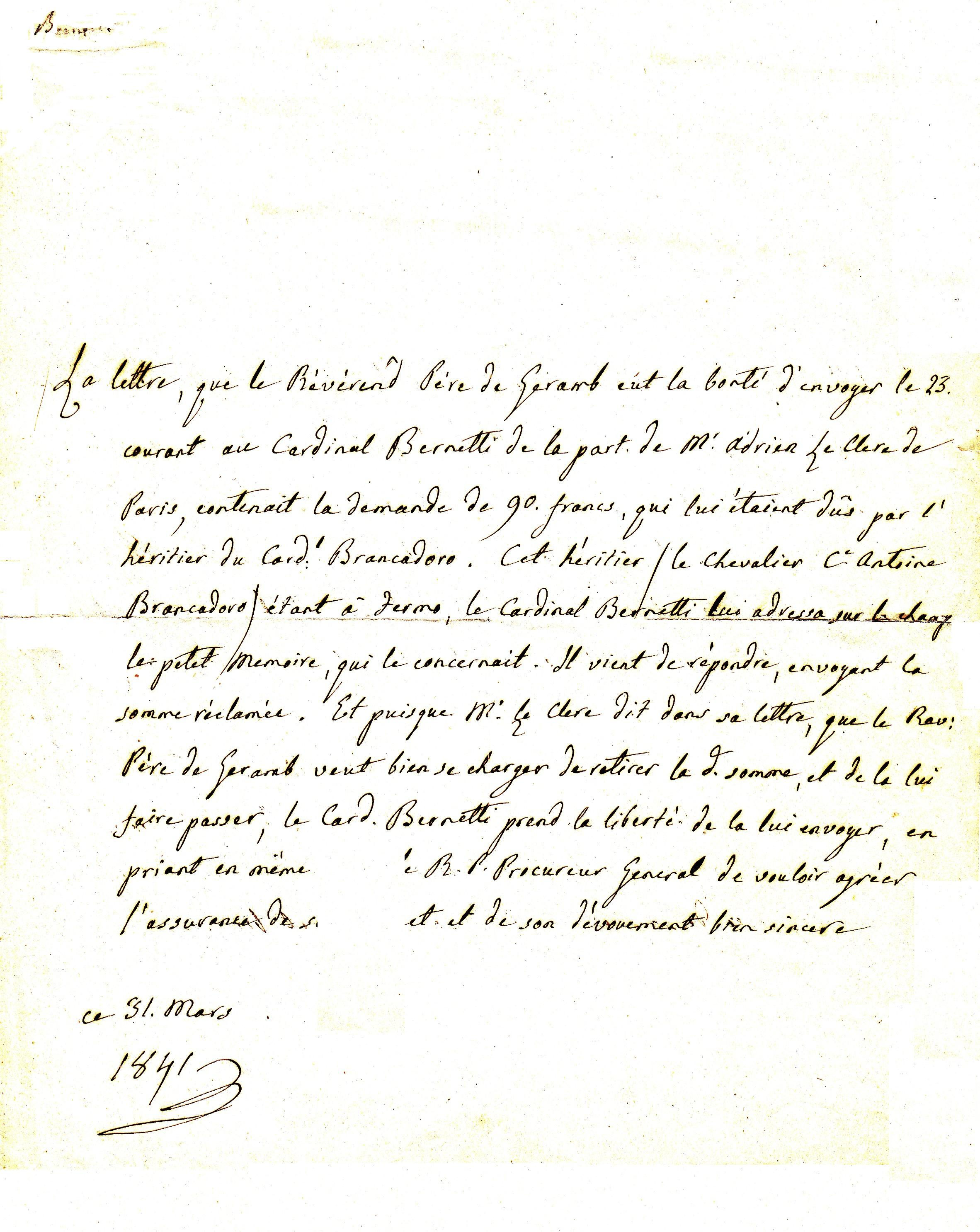 Служебное письмо Томмазо Бернетти 1841 от третьего лица